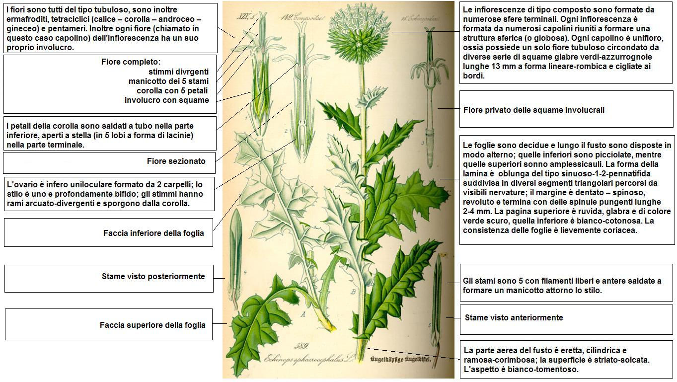 Descrizione del fiore